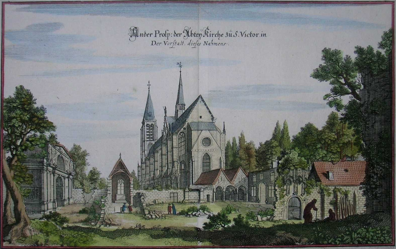 Église Saint-Victor de Paris en 1655